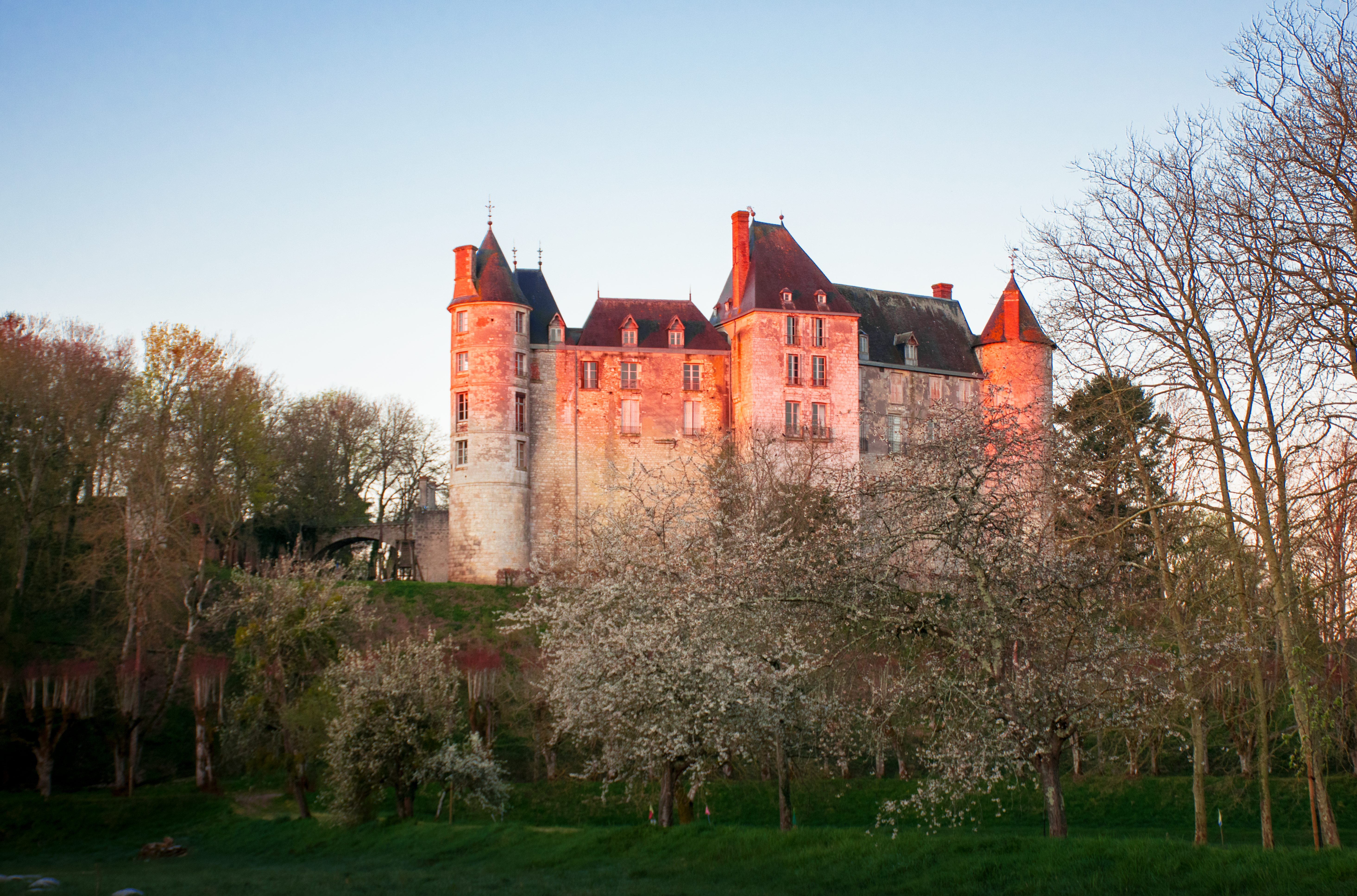 Un matin d'avril depuis le marronnier dans le parc du château de Saint Brisson.